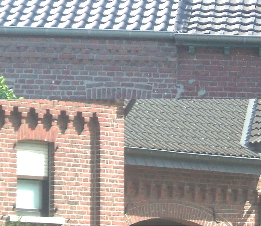 Historistische Friese (Zahn- und Klötzchenfriese - auch deutsches Band genannt) an alten Tüschenbroicher Häusern